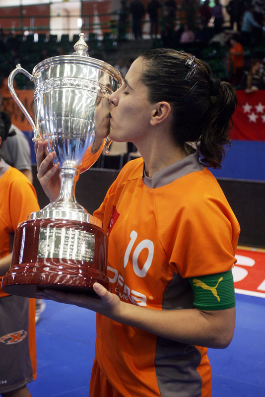 Eva Manguan con la Supercopa de España 2009